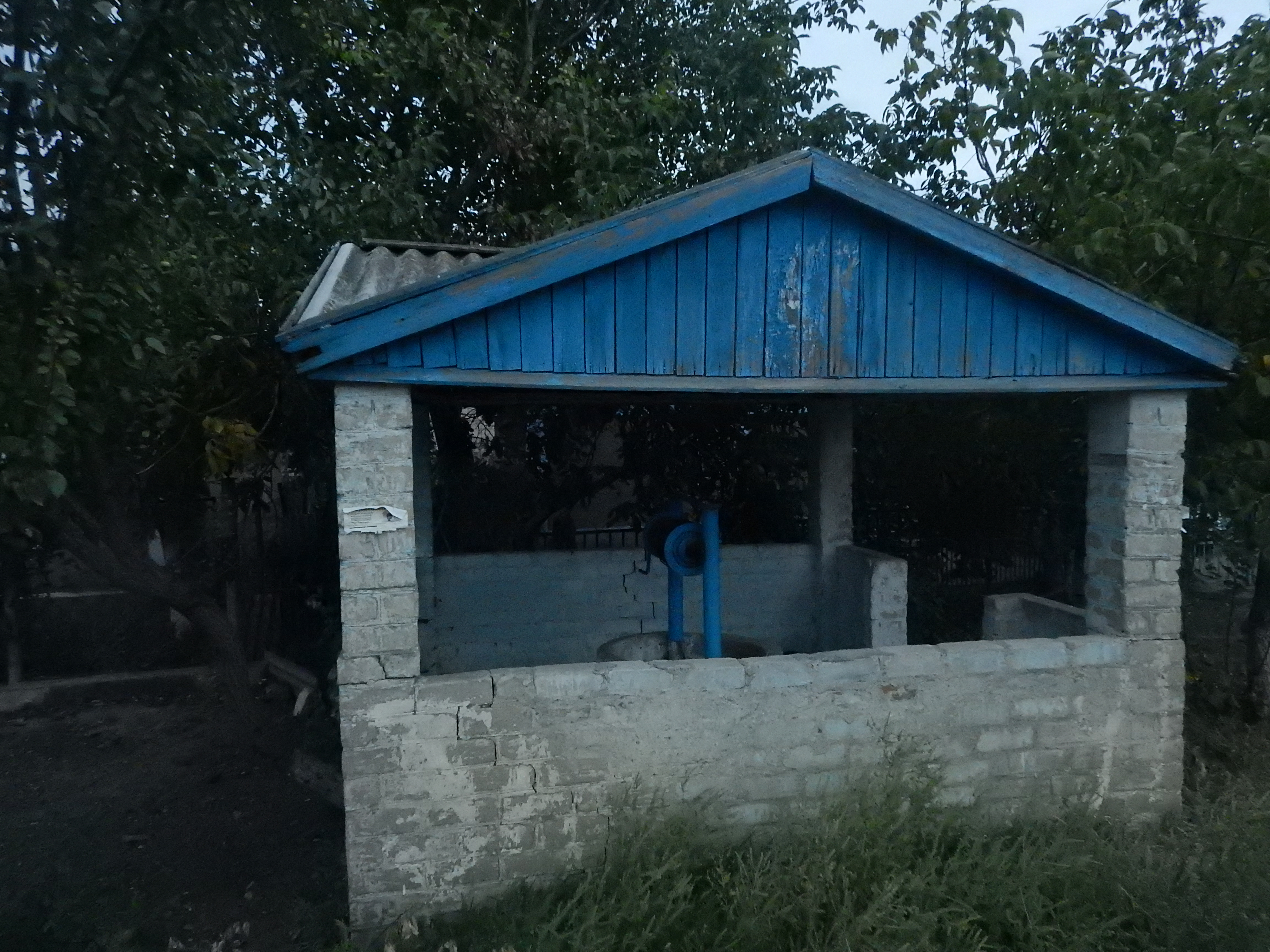 Криниця у с. Глибокояр, Захарівський район, Одеська область. Вікіекспедиція на північ Одещини